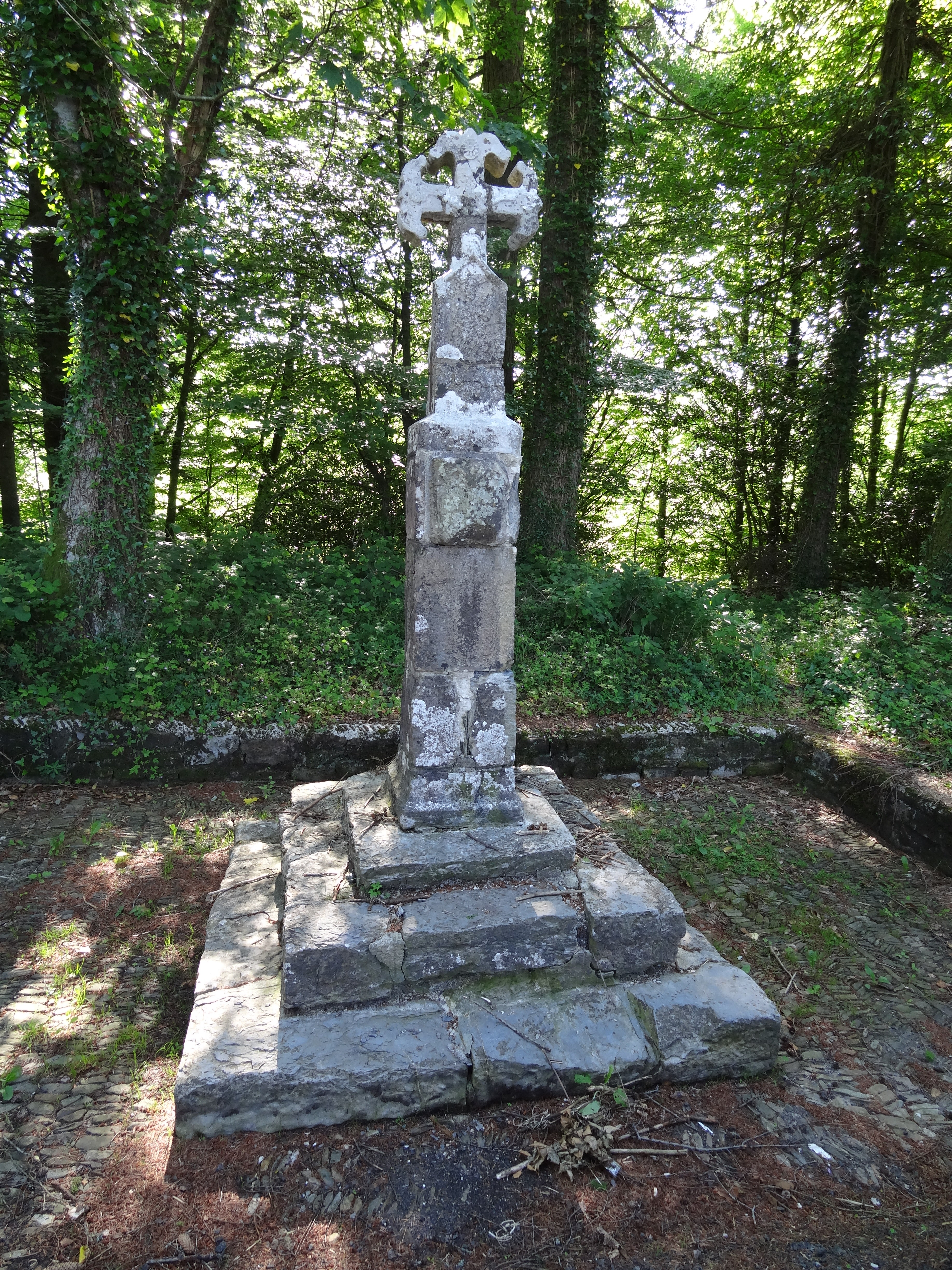 Cruz de los Peregrinos, Roncesvalles